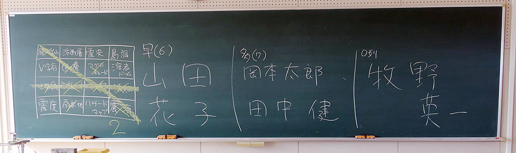 マッキーノの板書例。表彰の書き方の一例